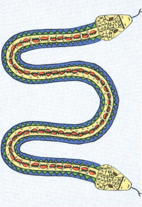 Una anfisbena (Amphisbaena), serpiente mitológica de dos cabezas, una a cada extremo del cuerpo.